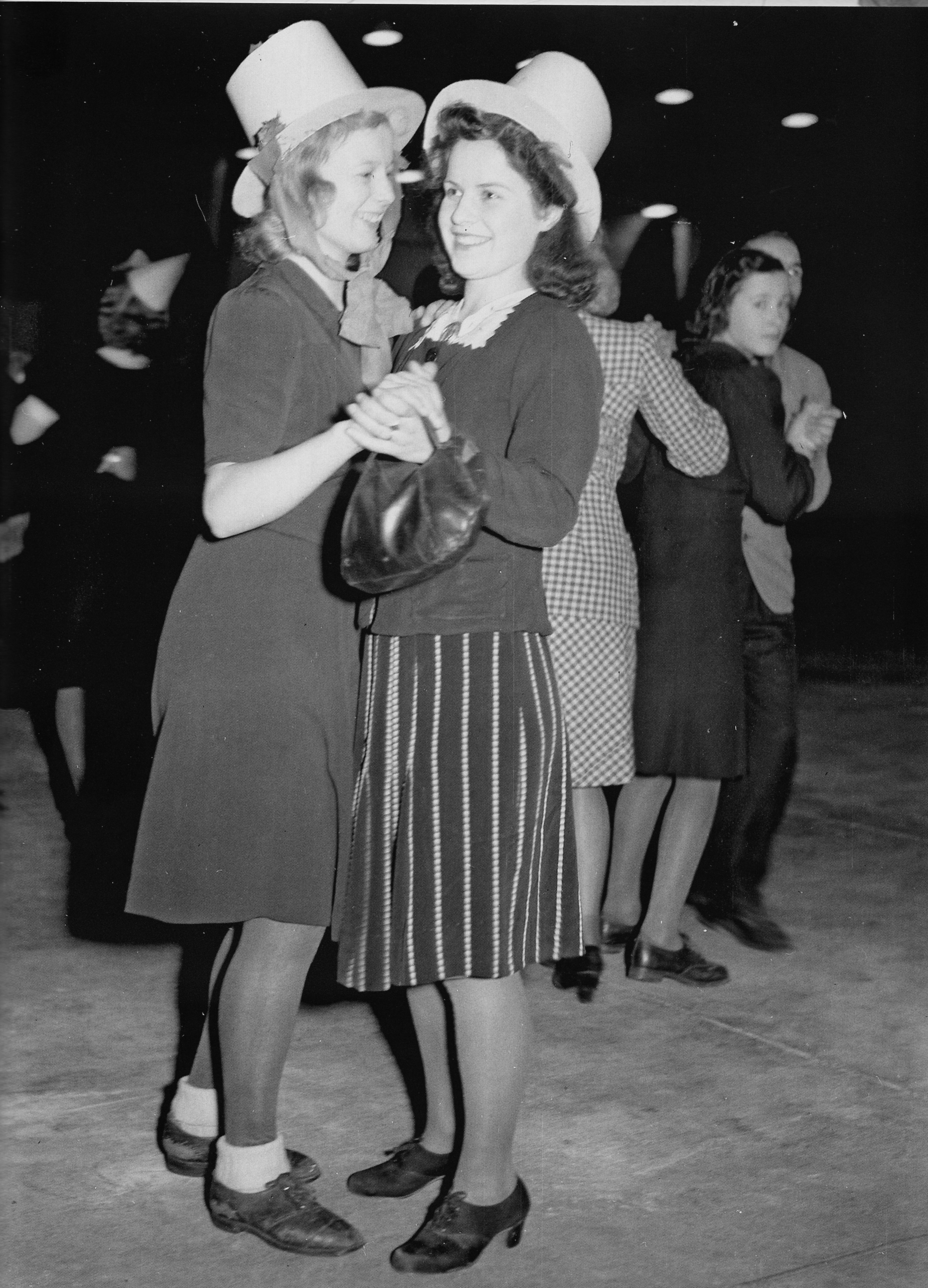 Tanssitilaisuudet sallittiin 1944 ja silloin voi tanssia härkäparina